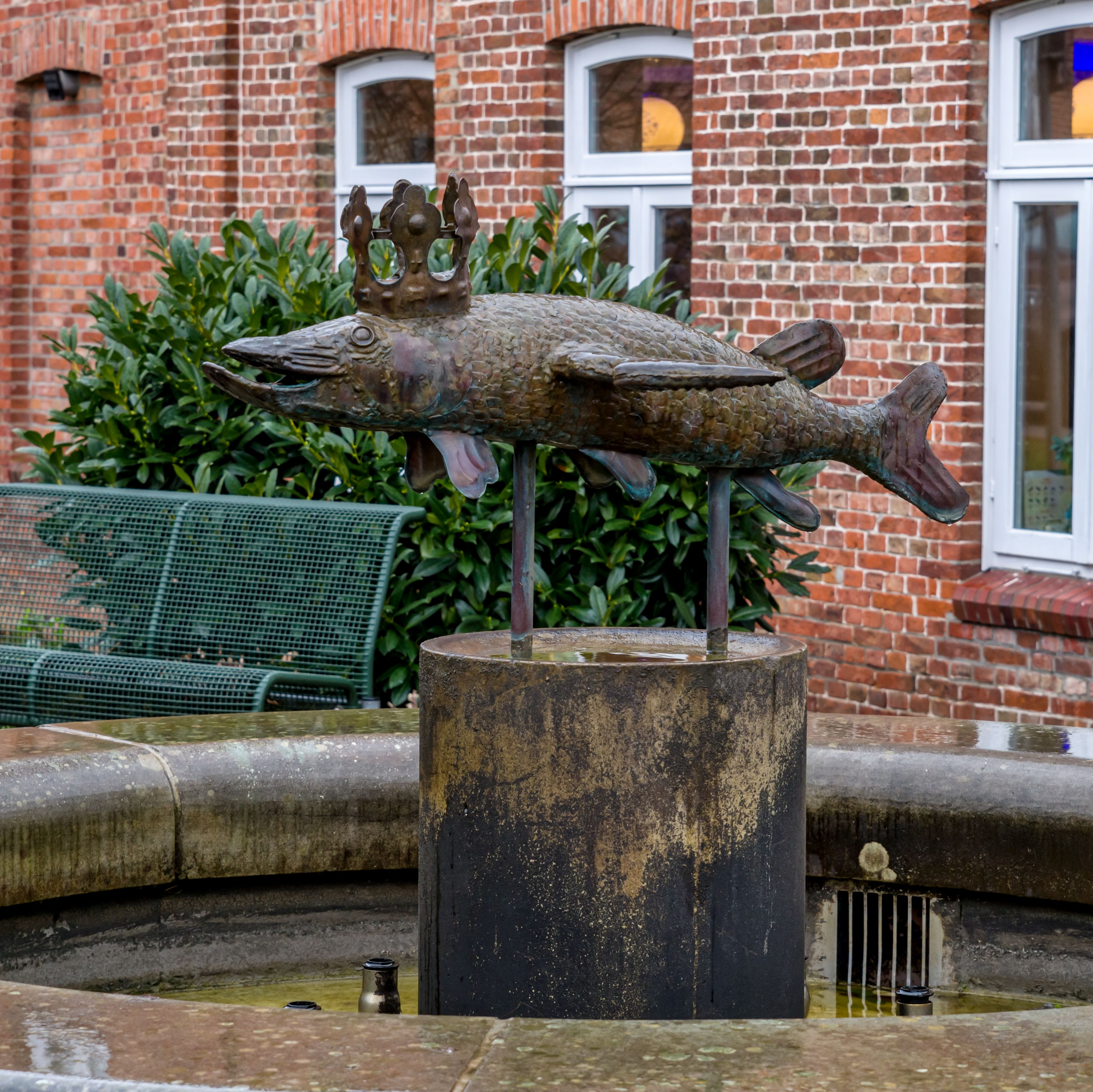 Der Hechtbrunnen am Marktplatz in Hechthausen